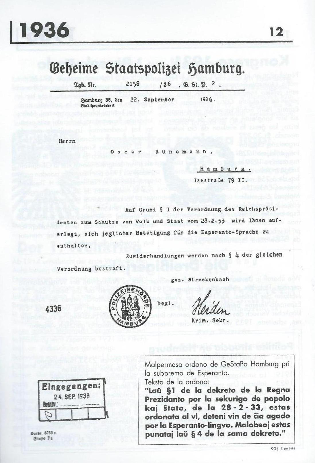 letero de la Geheime Staatspolizei Hamburg al August Oskar Bünemann, 1936